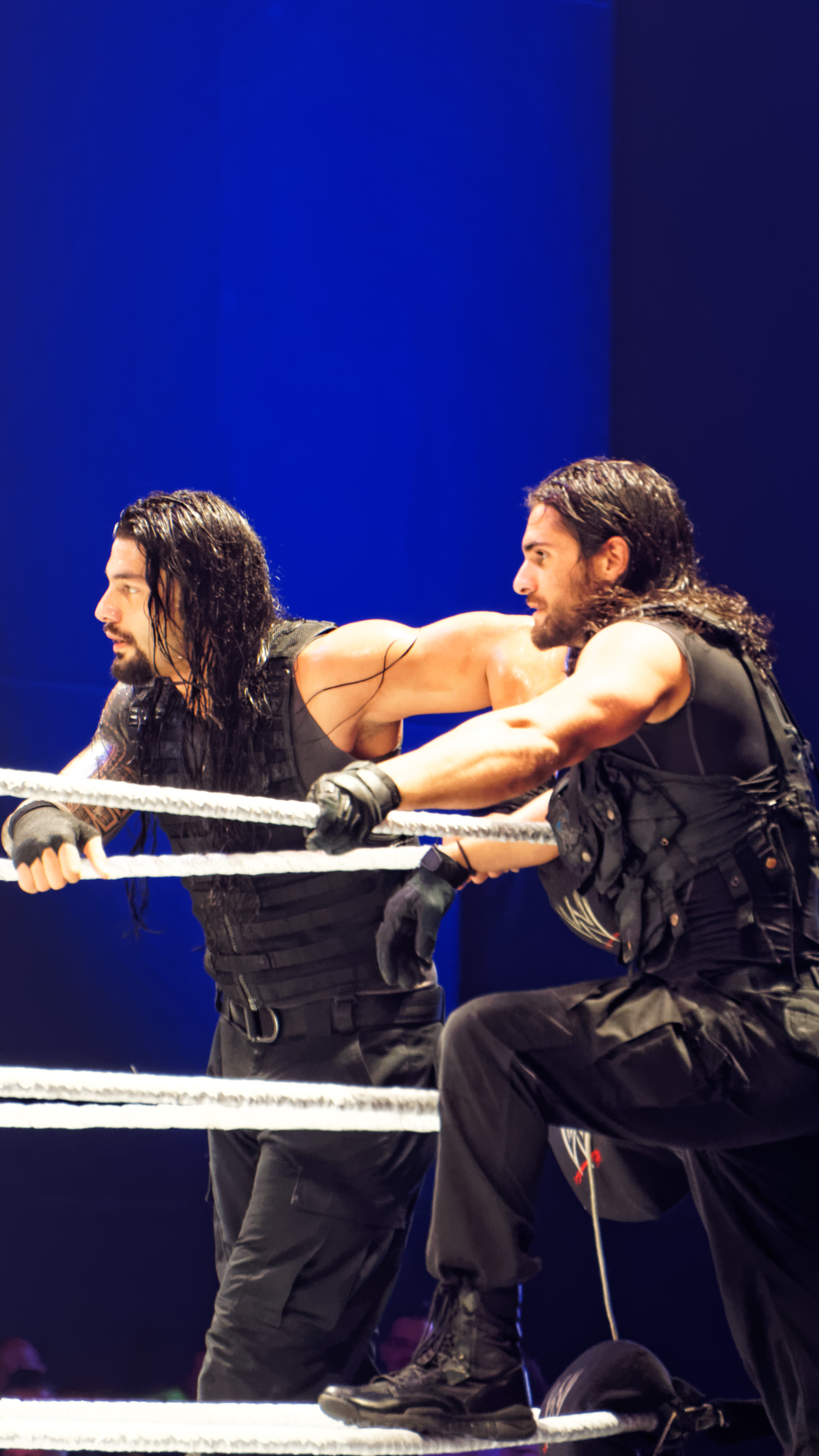 2014-05-22_22-26-00_ILCE-6000_2260_DxO